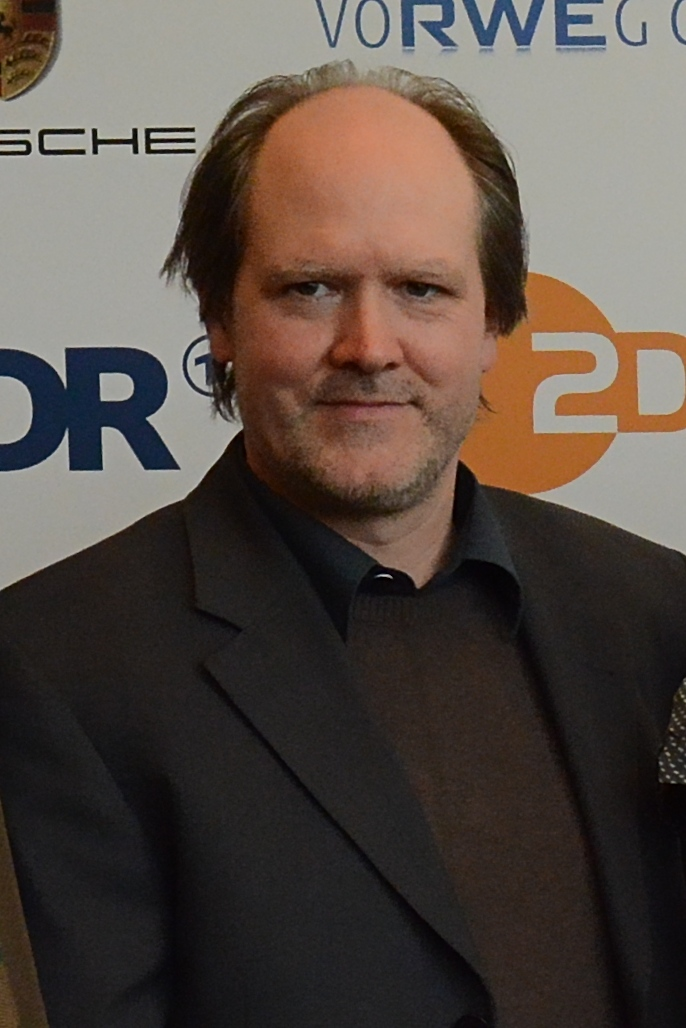 Daniel Nocke bei der Verleihung des Grimme-Preises 2014.